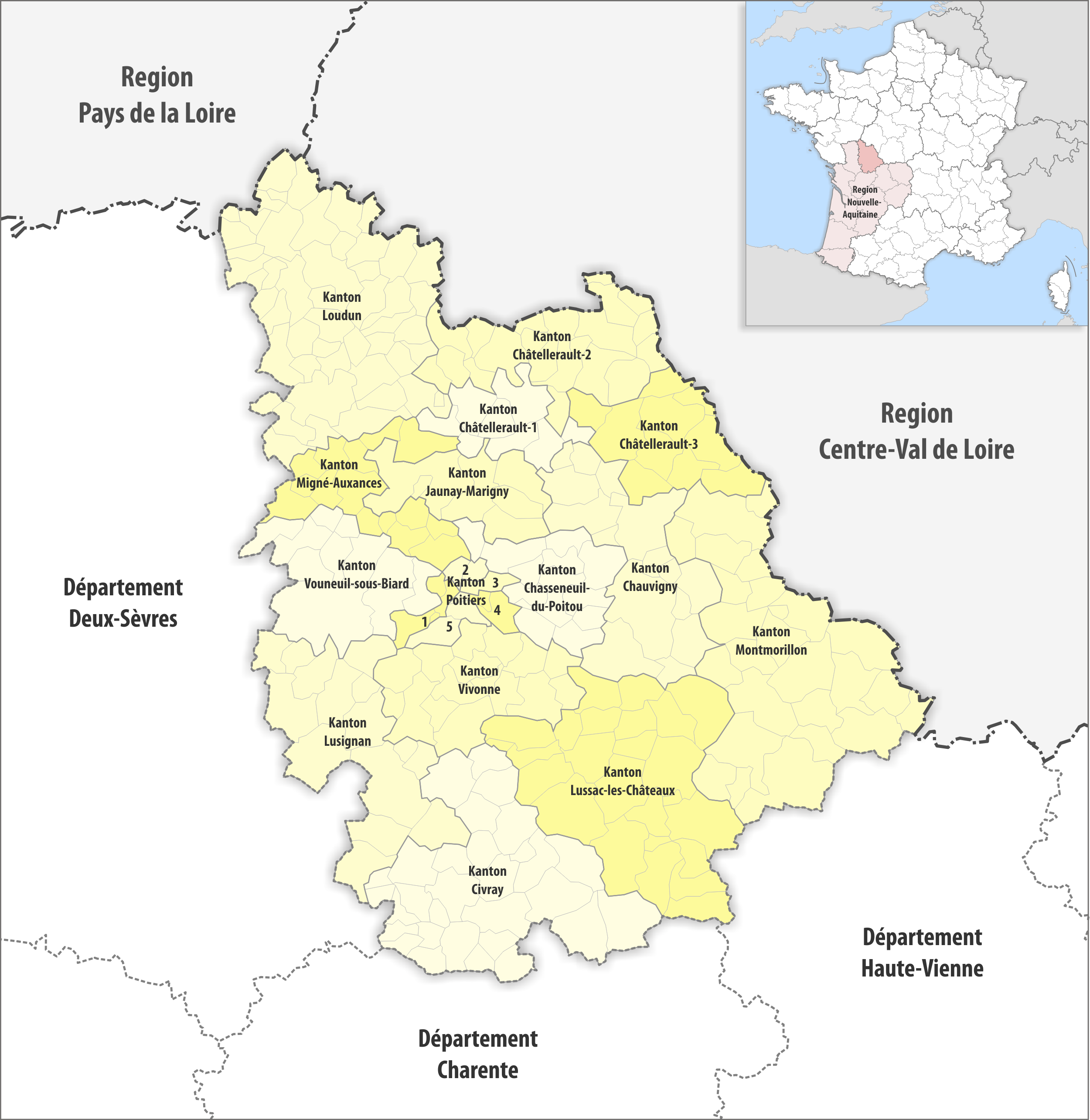 Gemeinden und Kantone im Departement Vienne